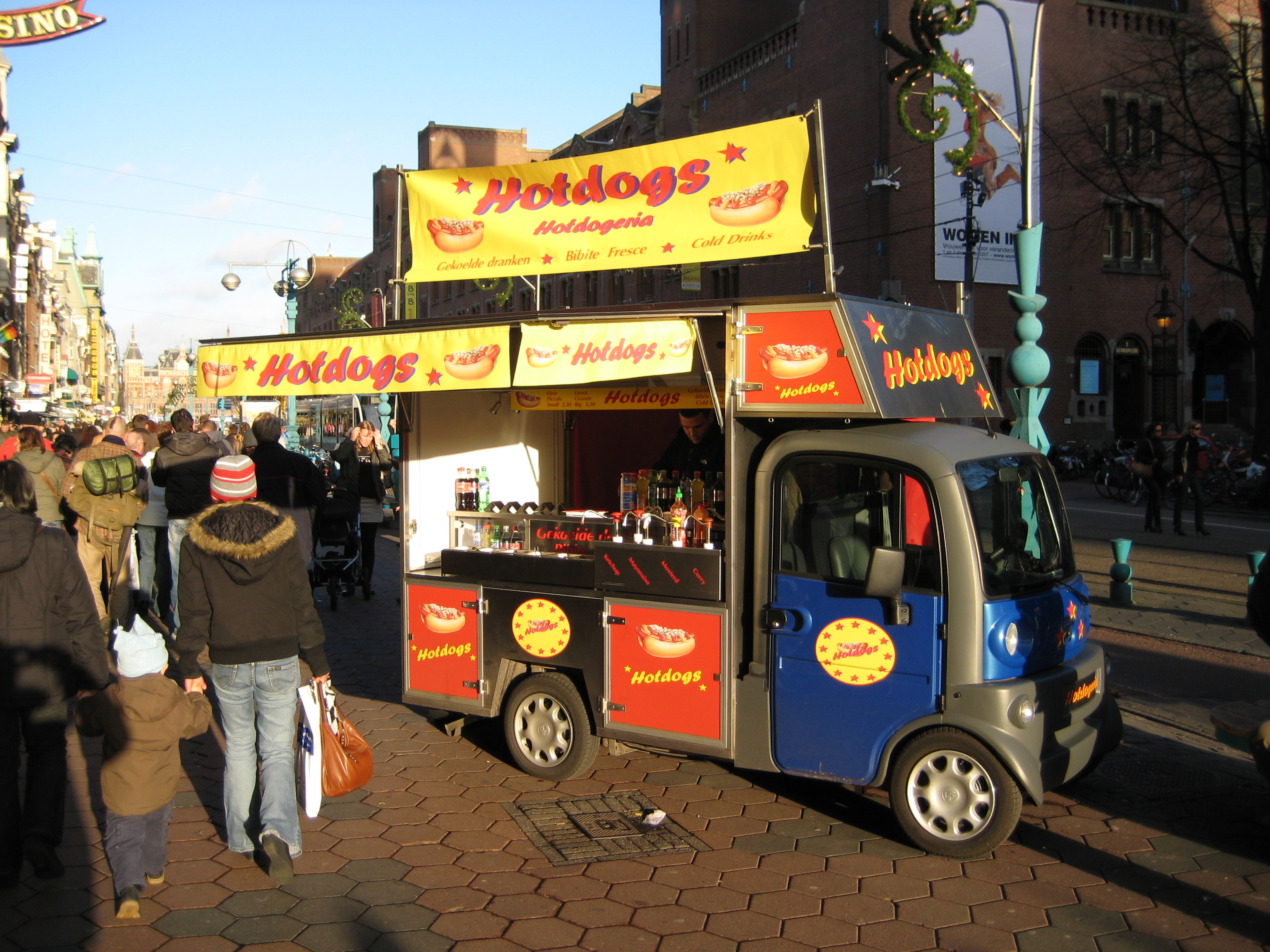 hotdog karretje in Amsterdam